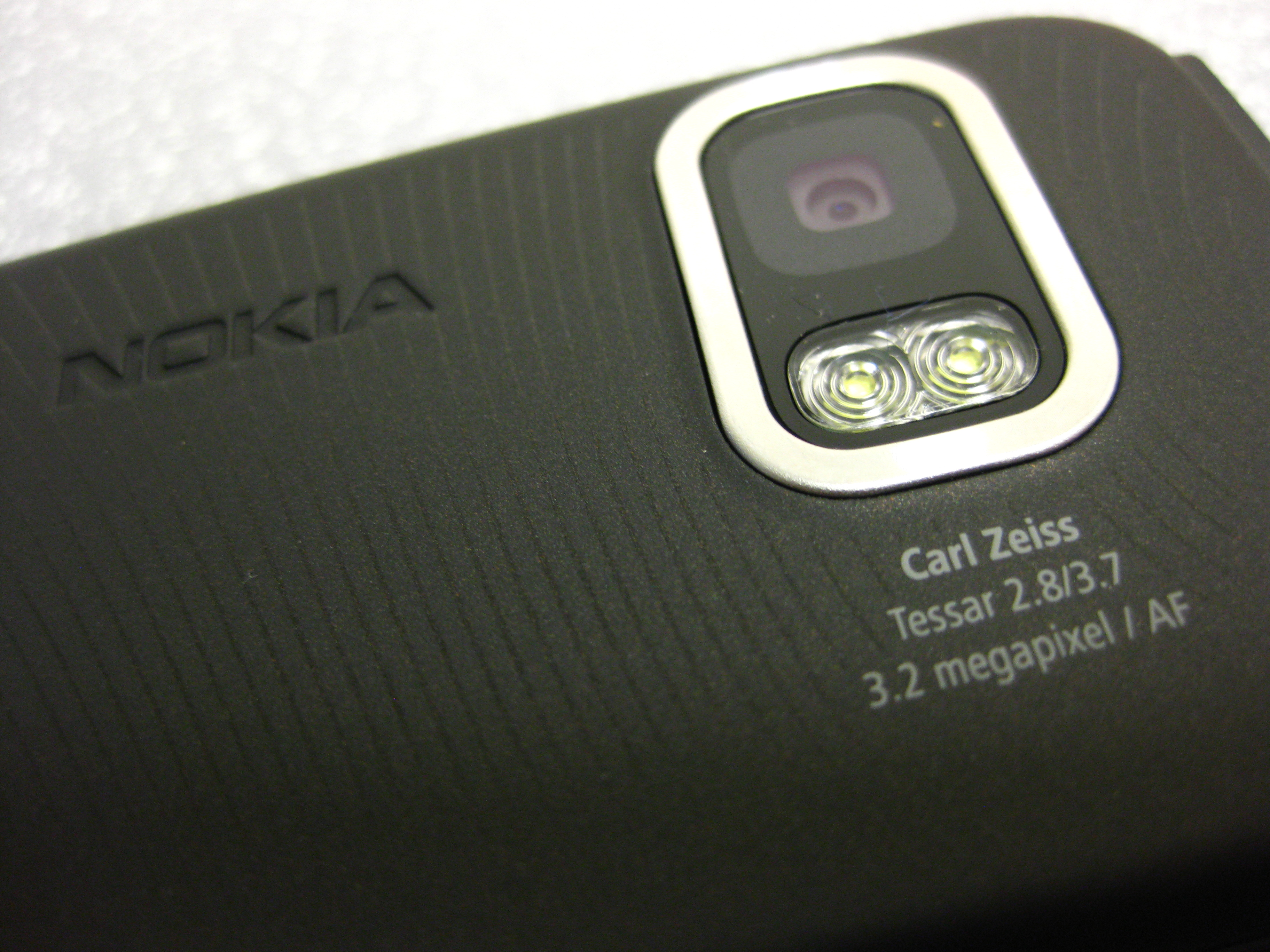 Nokia 5800 XpressMusic Camera